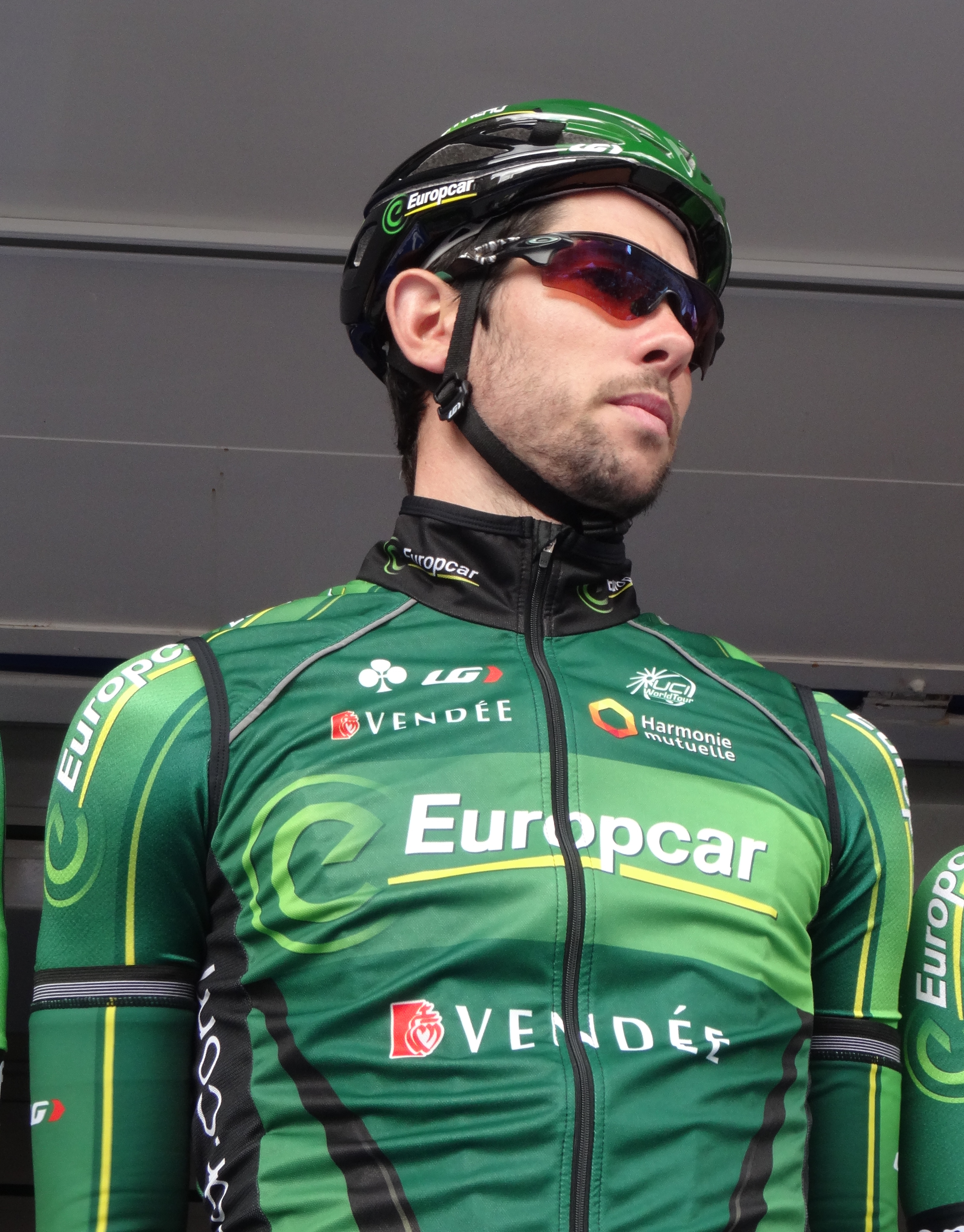 Reportage photographique réalisé le mercredi 7 mai 2014 au départ de la première étape de l'édition 2014 des Quatre jours de Dunkerque à Dunkerque, Nord, Nord-Pas-de-Calais, France. Depicted person: Bryan Nauleau Depicted team: Europcar